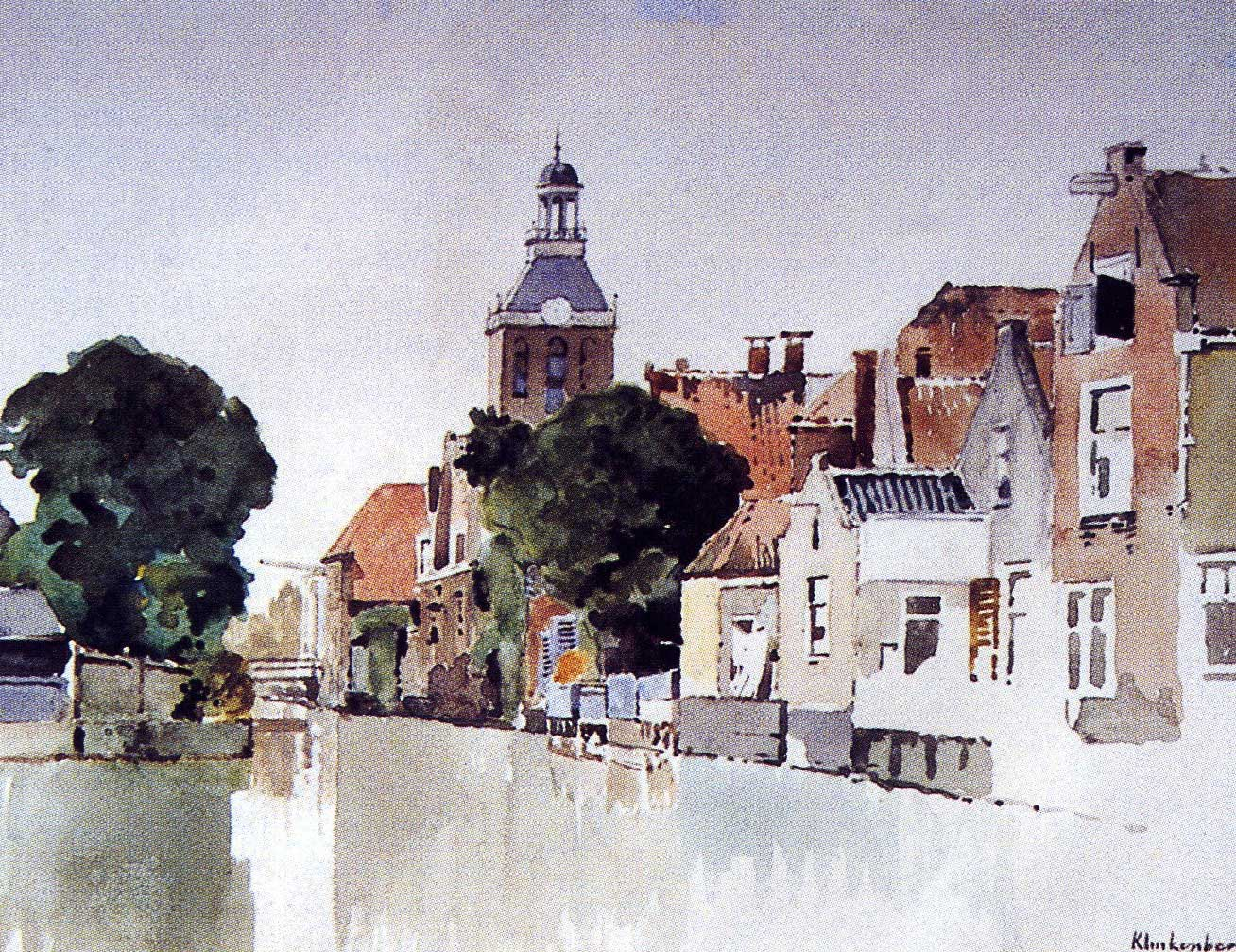 Gracht in Meppel met kerk